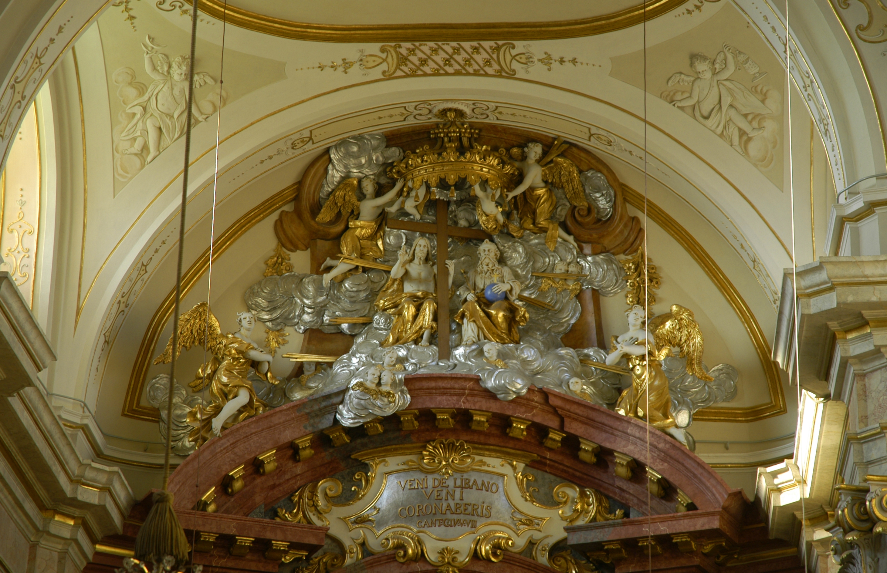 Altaraufsatz des Hochaltares der kath. Pfarrkirche Mariae Himmelfahrt in Straning